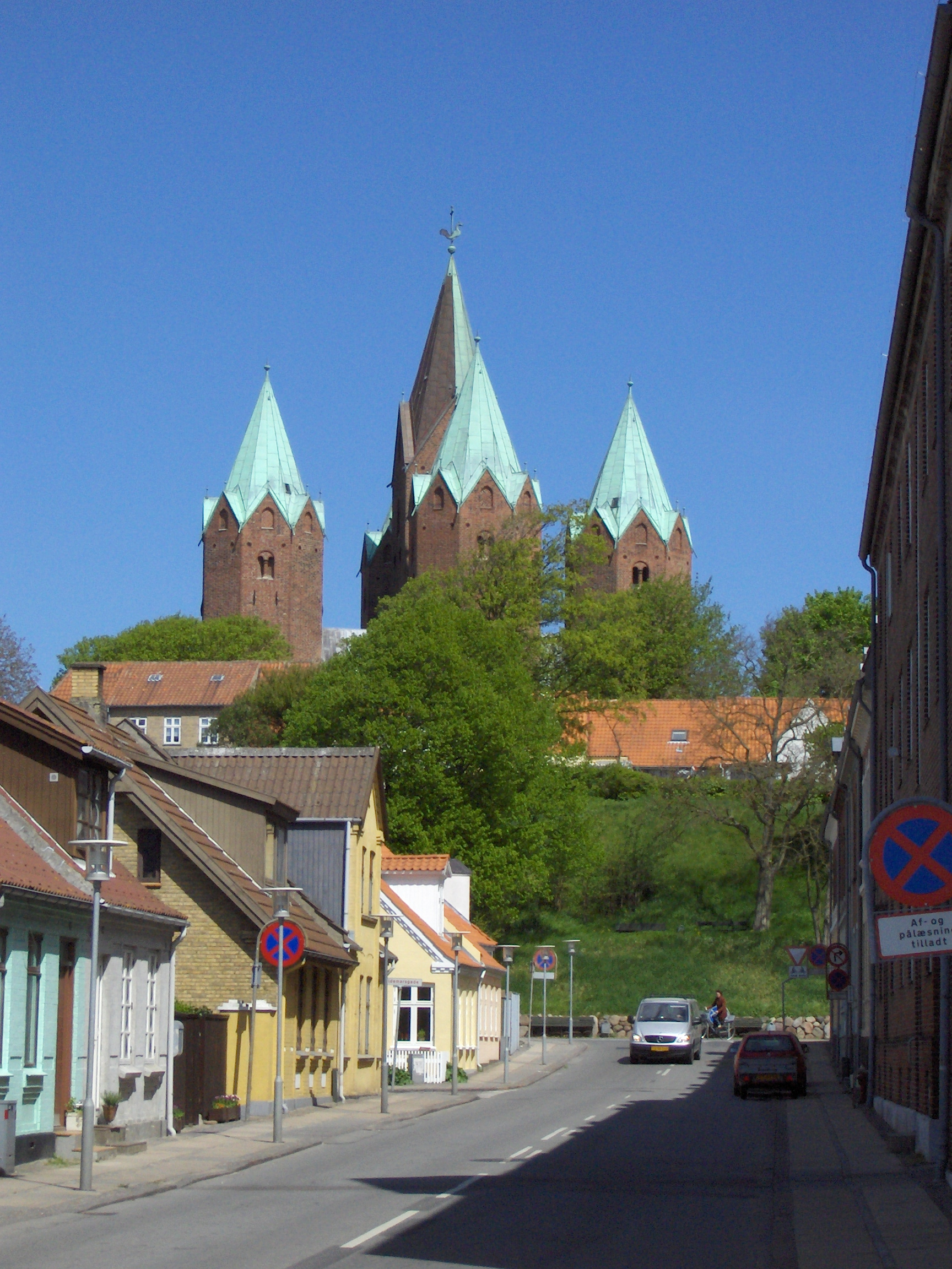 Vor Frue Kirke i Kalundborg set fra Hærvigsgade, optaget af mig selv...